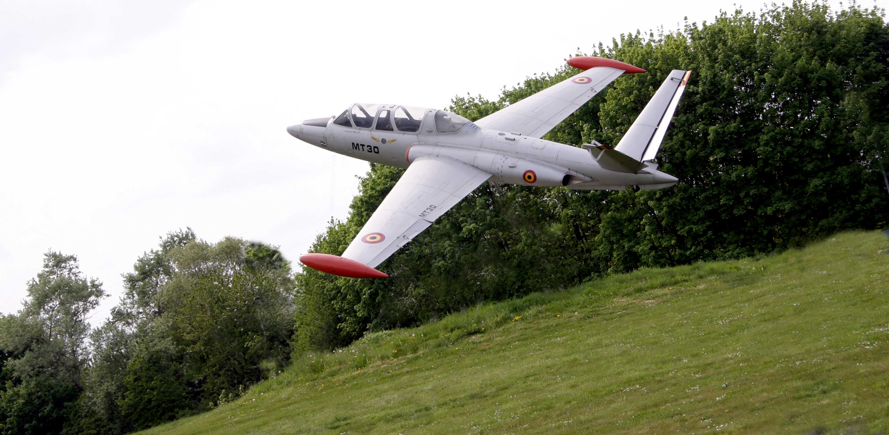 Eng Fouga Magister